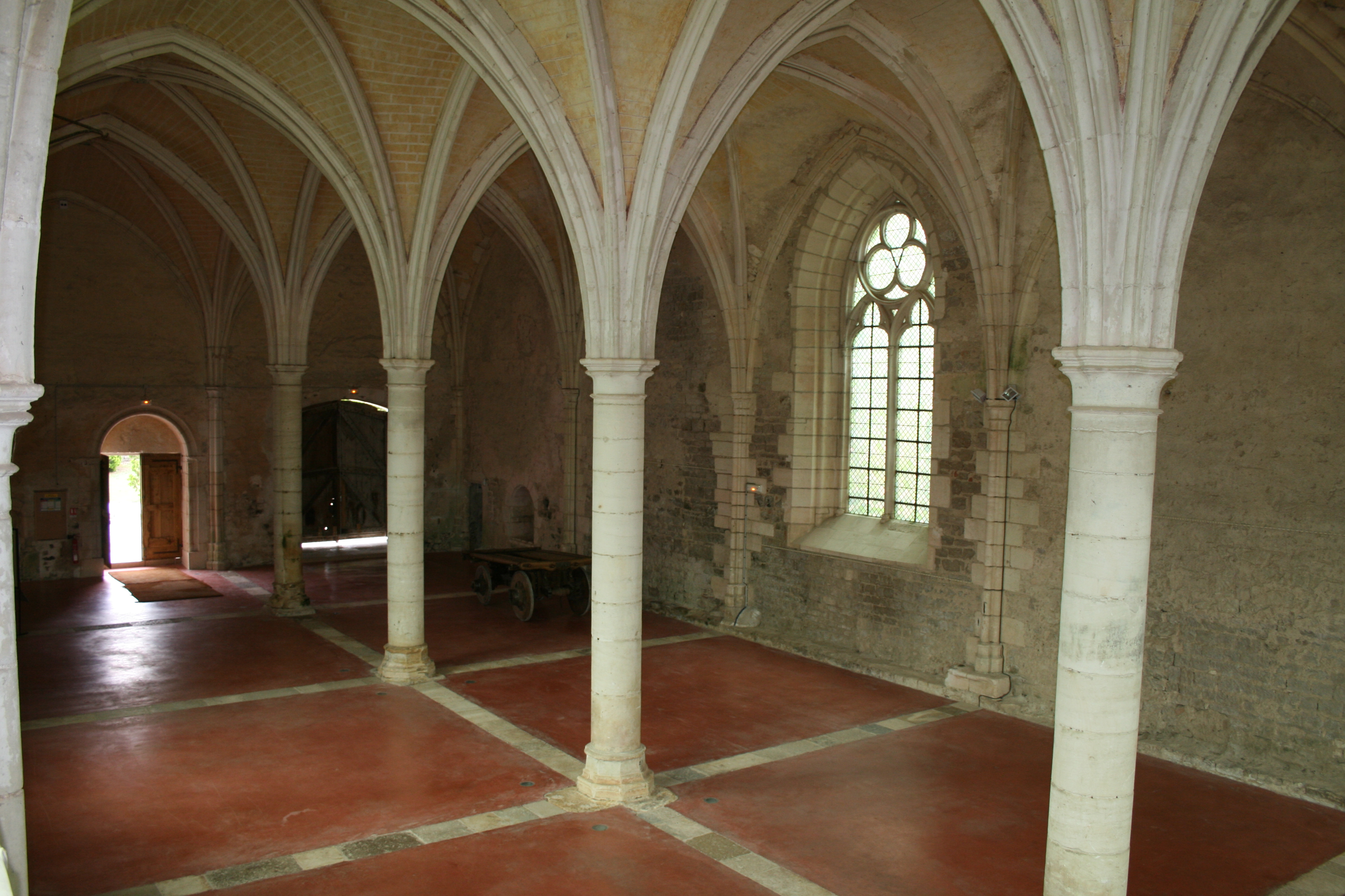 Vermenton Abbaye de Reigny Réfectoire